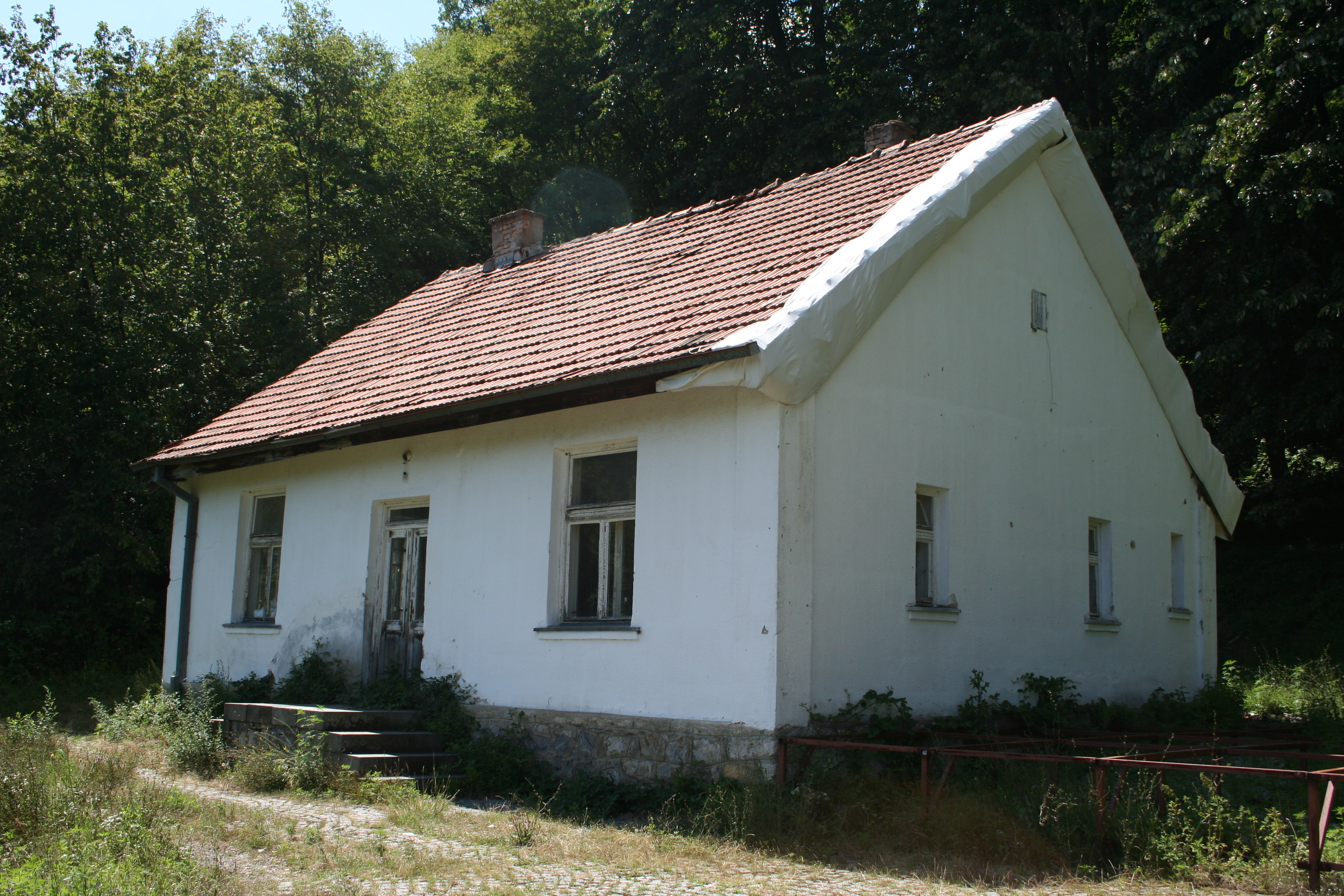 Znamenito mesto Stolice kod Krupnja